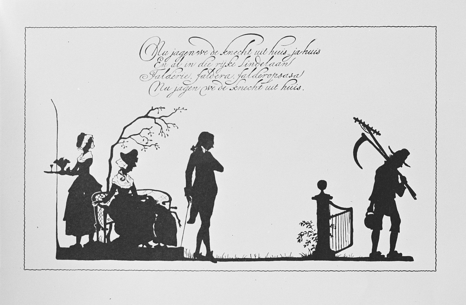 Collectie / Archief : Fotocollectie Anefo Reportage / Serie : [ onbekend ] Beschrijving : tentoonstellingen, Nelly Bodenheim Datum : 5 oktober 1949 Trefwoorden : tentoonstellingen Persoonsnaam : Nelly Bodenheim Instellingsnaam : Stedelijk Museum Fotograaf : Noske, J.D. / Anefo Auteursrechthebbende : Nationaal Archief Materiaalsoort : Glasnegatief Nummer archiefinventaris : bekijk toegang 2.24.01.09 Bestanddeelnummer : 903-6390 Reacties Geplaatst door Maaike op 23 maart 2013 - 14:42. één van de zeven Amsterdamse Joffers